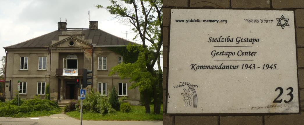 Radomsko. Otwarte Muzeum Żydowskie 23